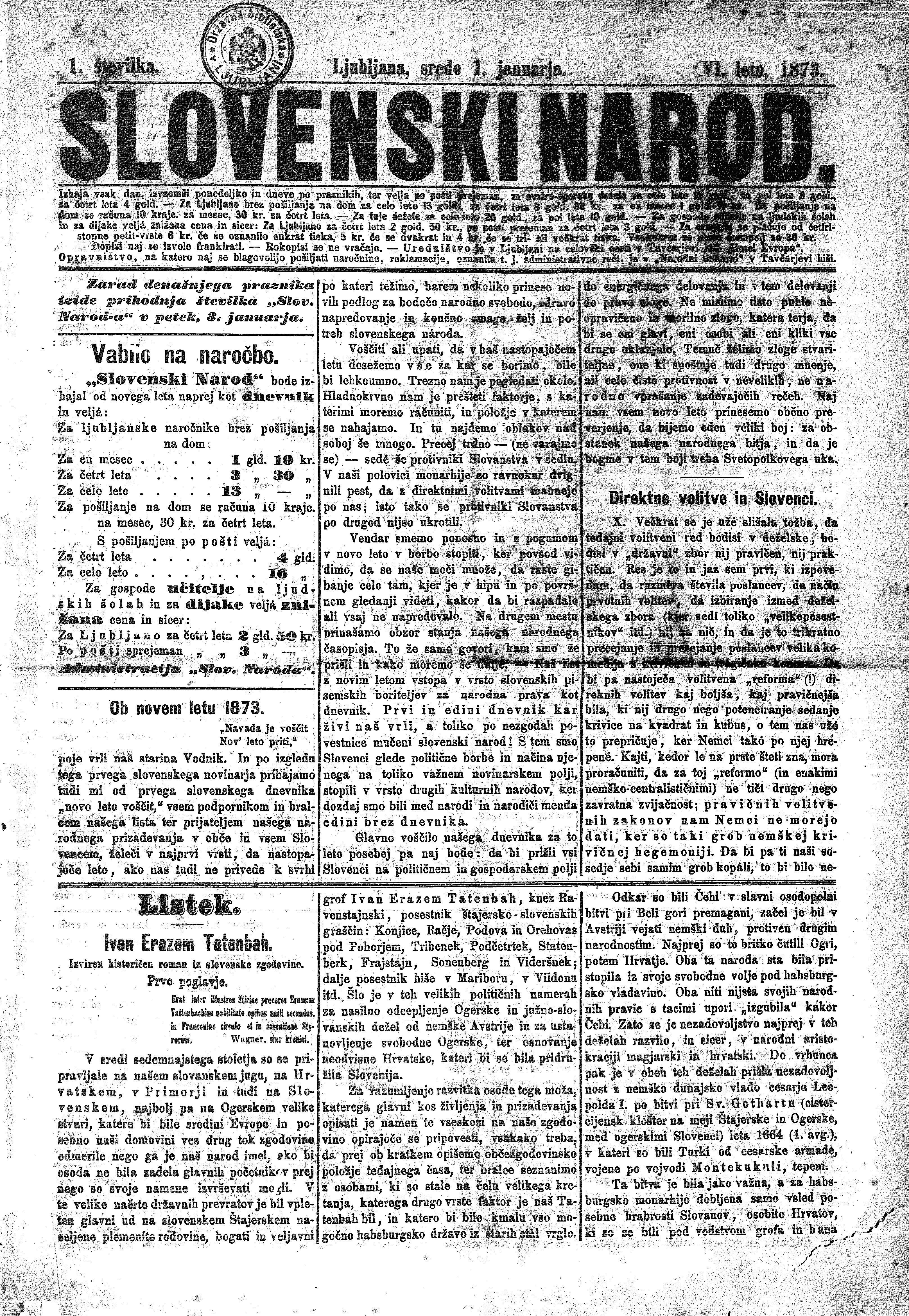 Naslovnica prve številke časopisa Slovenski narod, ko je začel izhajati vsak dan, torej kot dnevnik.